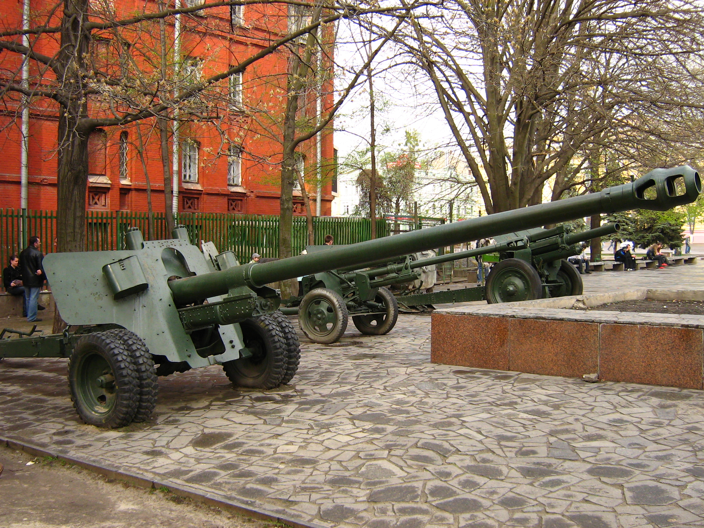 Артиллерия на площади Конституции, город Харьков. 1-я — 100-мм БС-3, за ней — ЗиС-3 и гаубица М-30. --Saəデスー? 17:33, 14 июля 2008 (UTC)